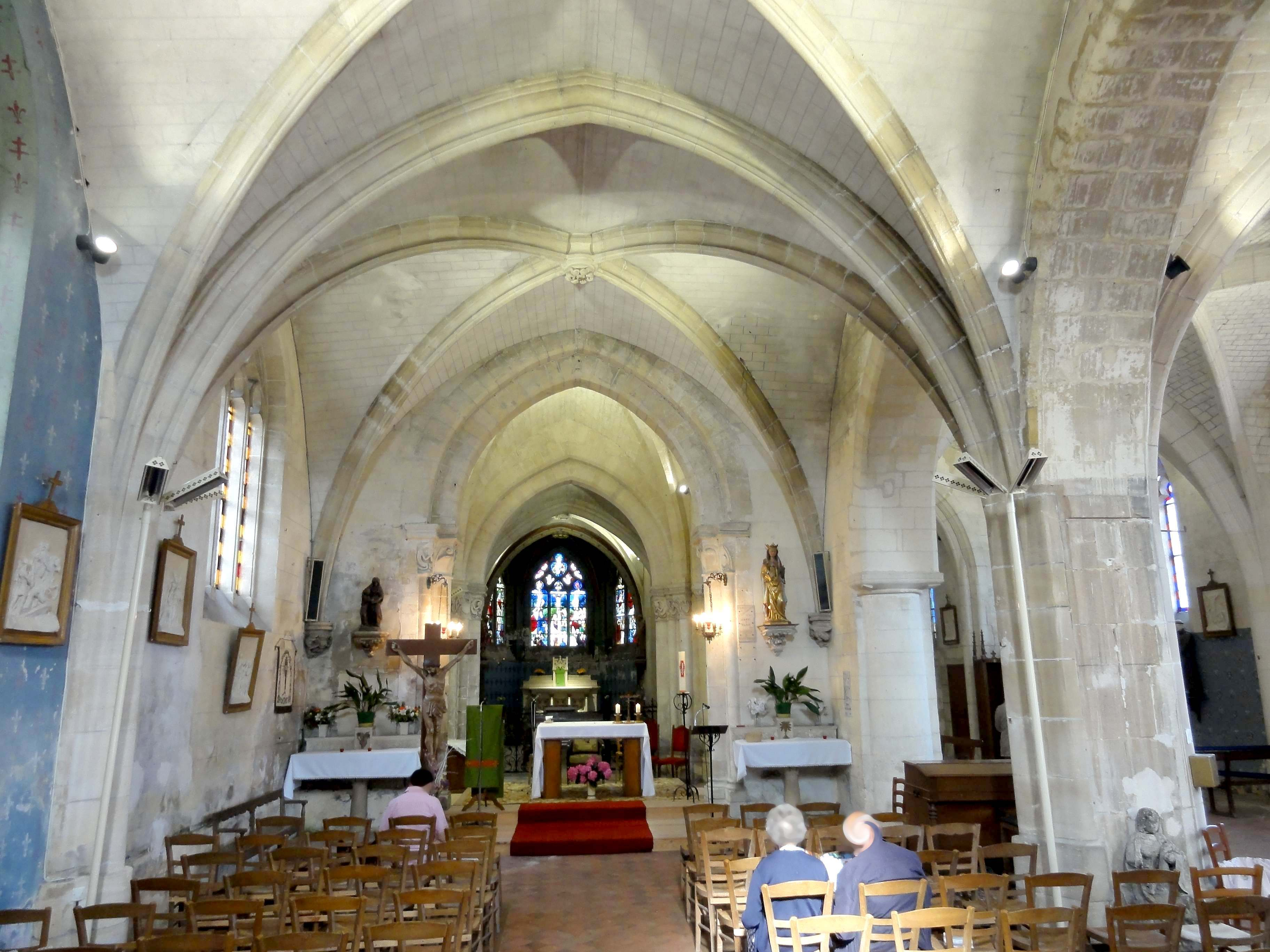 Intérieur de l'église (voir titre).